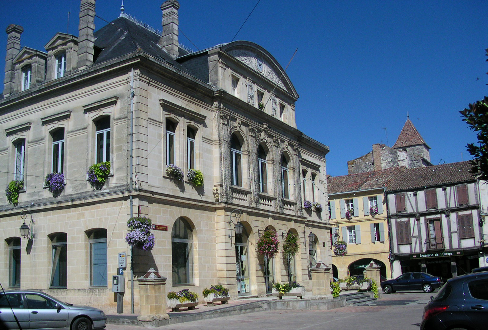 Mairie Ste-Foy-la-Grande